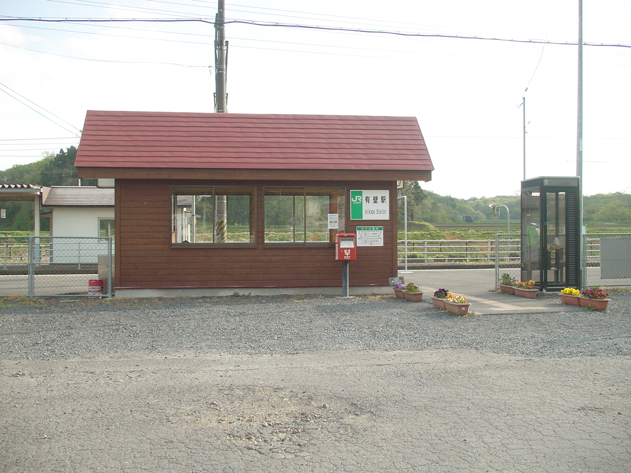 （有壁駅）